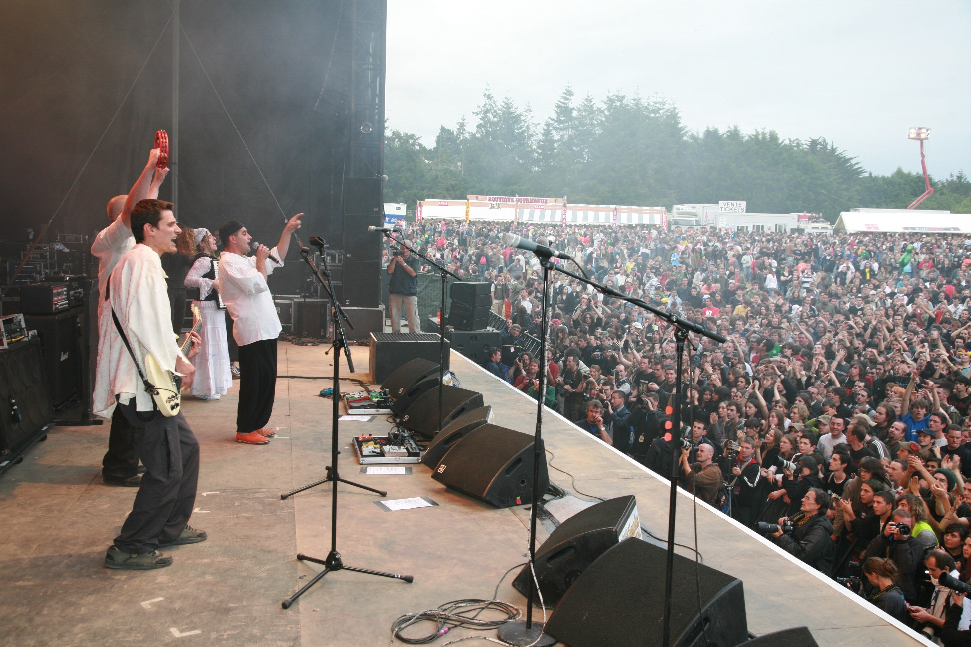 Le groupe Kalffa devant 57000 personnes sur la scène du festival des Terre neuvas